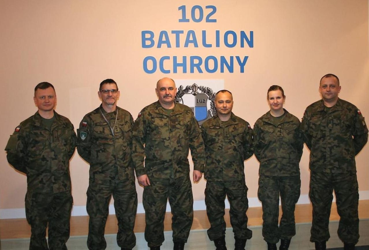 Bielkowo. 102 batalion ochrony